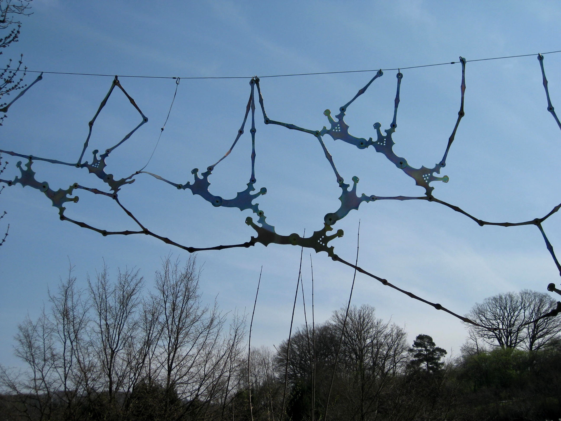 Hellmut Ehrath, Figurengruppe, 2002, (Detail), Brücke im Sommerhofenpark, Sindelfingen, Deutschland